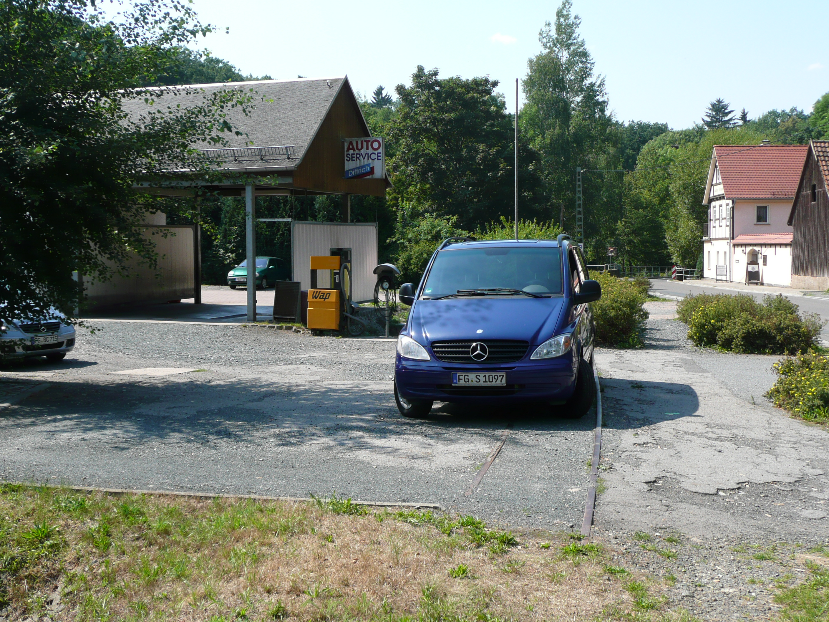 Gleisrest und Tankstelle oberhalb der Haltestelle Oberreinsberg der ehemaligen Kleinbahn Wilsdruff-Nossen